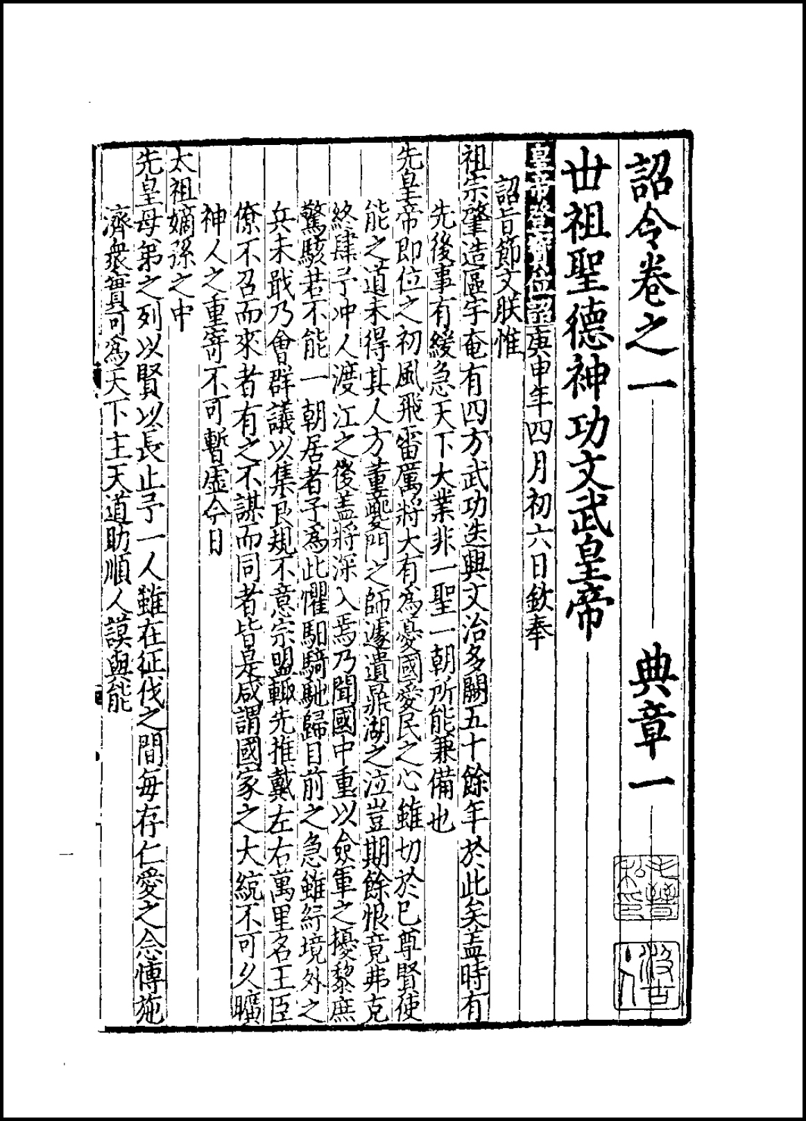 元世祖忽必烈在庚申年（1260年）农历四月发布的即位诏书《皇帝登宝位诏》，节选自元英宗时期元朝官修政书《大元圣政国朝典章》（简称《元典章》），台北国立故宫博物院藏元刊本之影印本